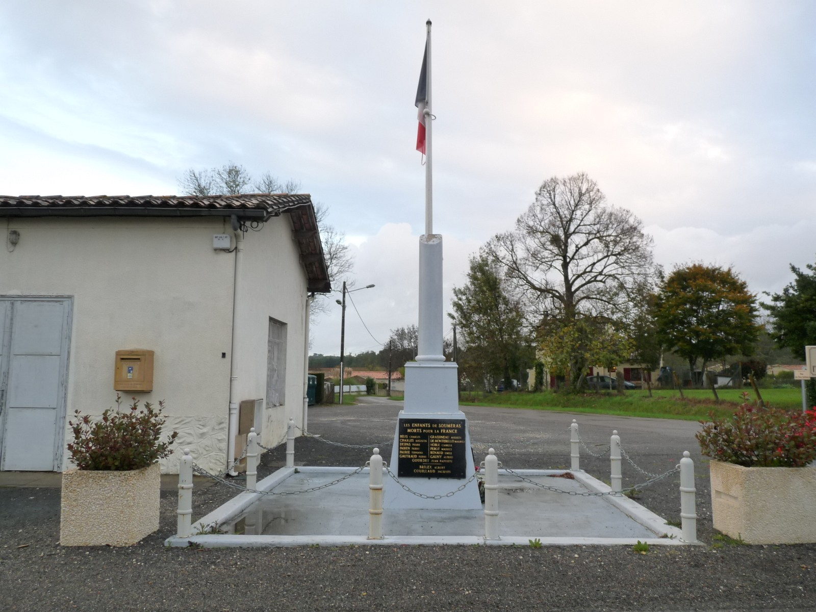 Monument aux morts, Souméras, Charente-Maritime, France